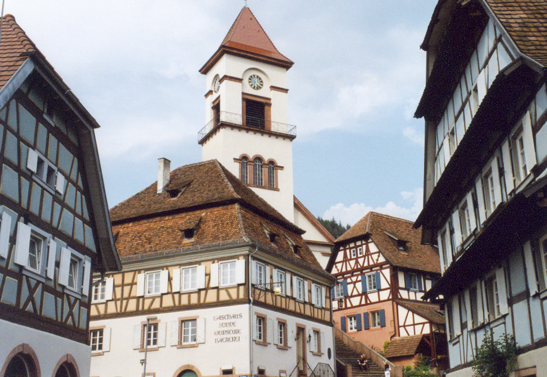 Der Ortskern von Münchweier: Fachwerkhäuser und Kirche im Weinbrenner-Stil, letztere erbaut 1828/29 nach Entwurf von Hans Voss.